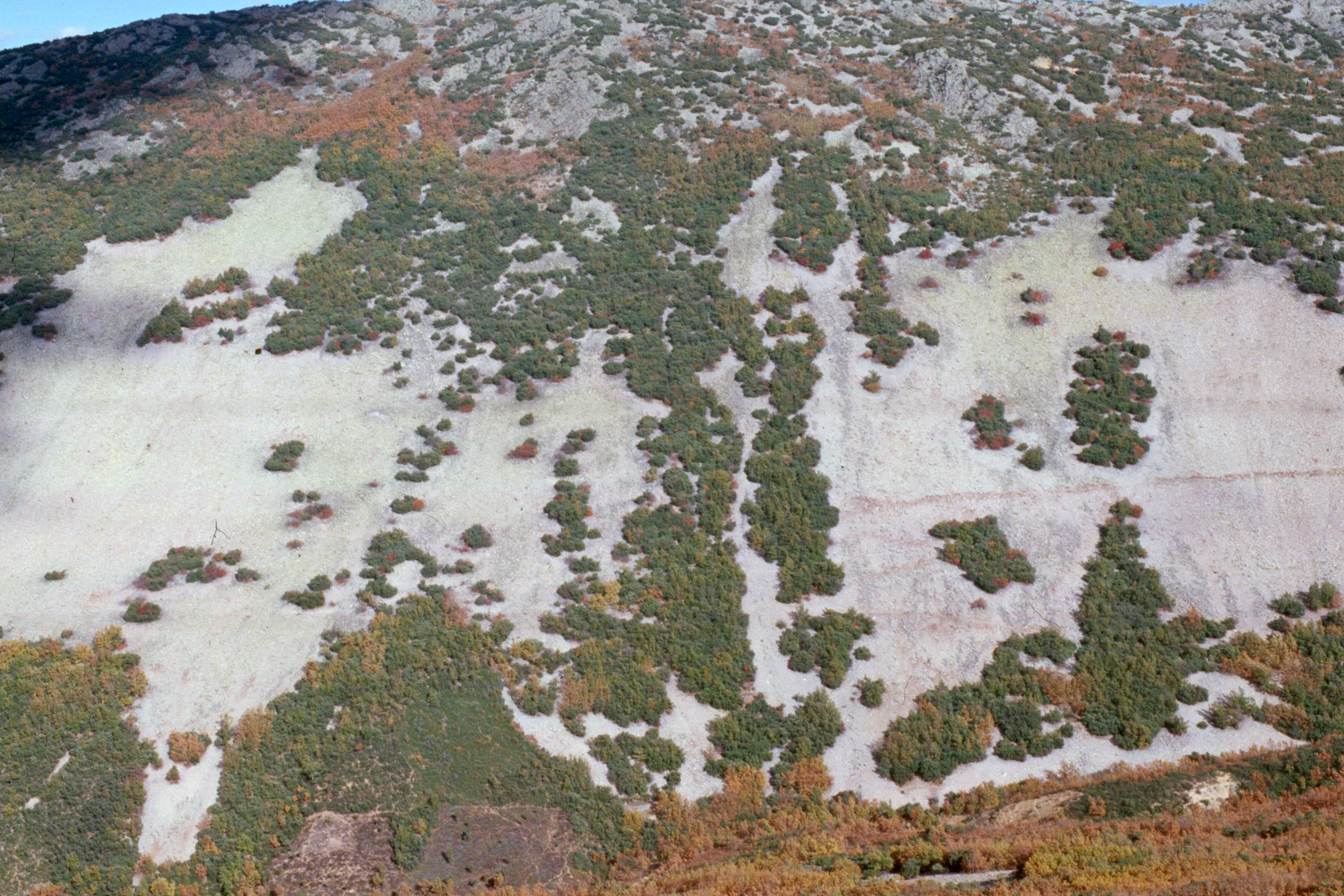 Canchales, Montes de Toledo, España.